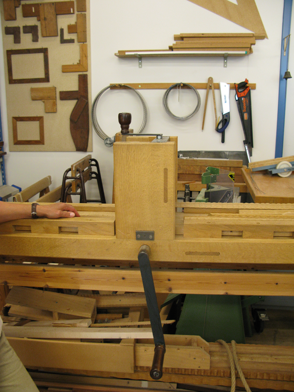 Flammelistehøvl #1 detalje. Set på nationalmuseets møbelkonserveringsværksted i Brede.